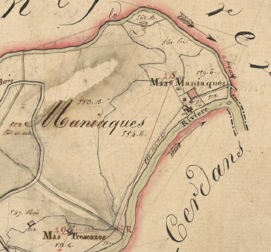 Manyaques, del Tec, en el Cadastre napoleònic del 1812 (Arxius Departamentals dels Pirineus Orientals)